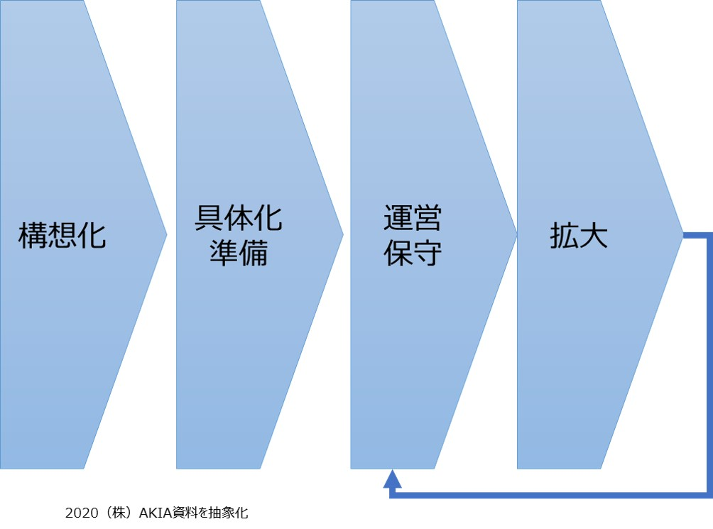 社会システムデザイナーおよび社会システムＰＭＯが行うプロセス